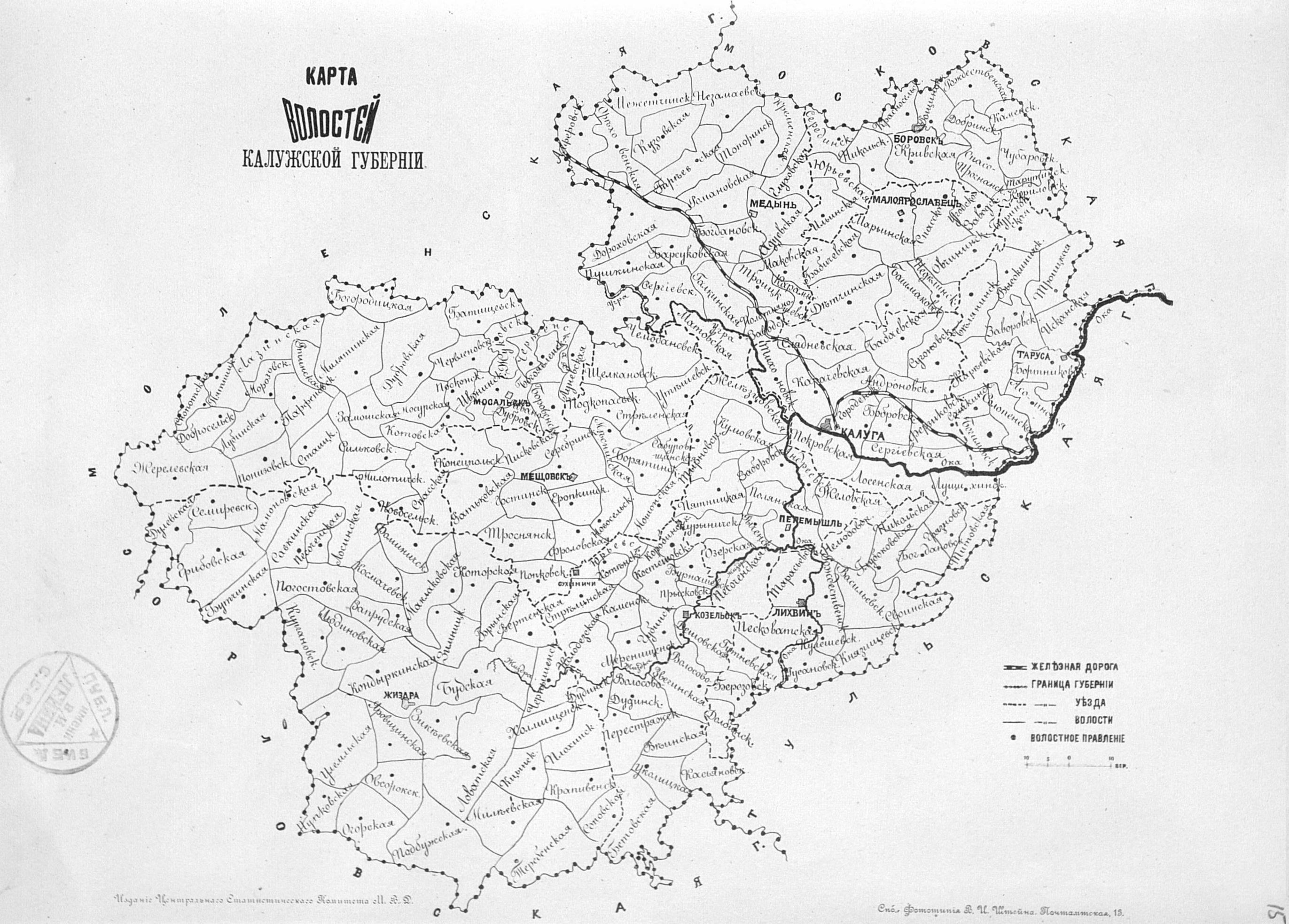 Карта волостей Калужской губернии